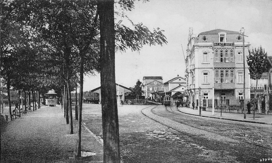 Palace Hotel, Coimbra, e antiga estação Coimbra-Cidade